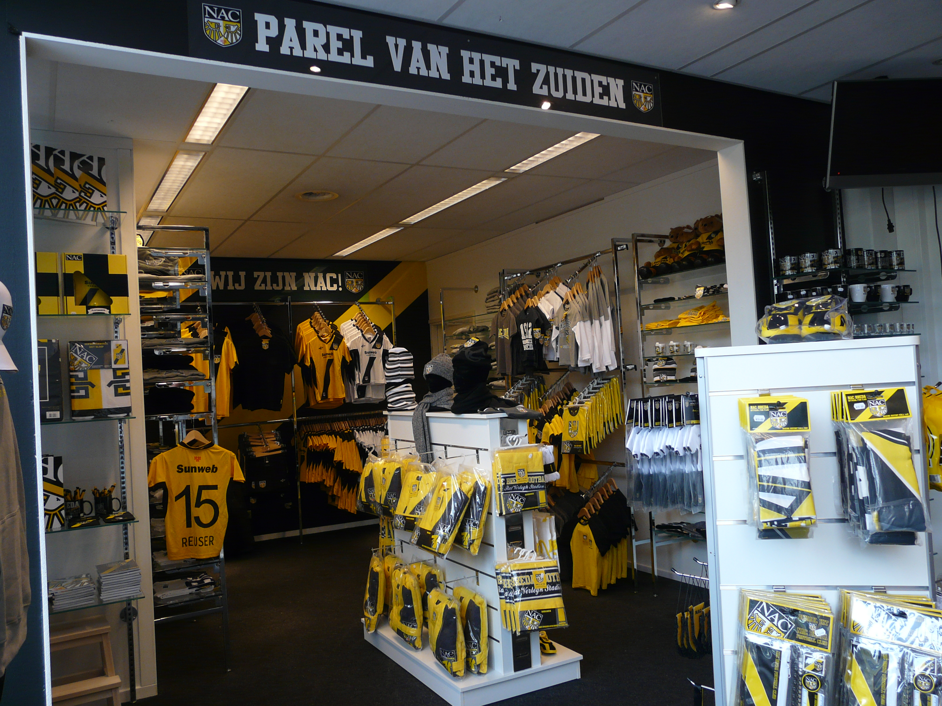 Rat Verlegh Stadion van NAC Breda in Breda